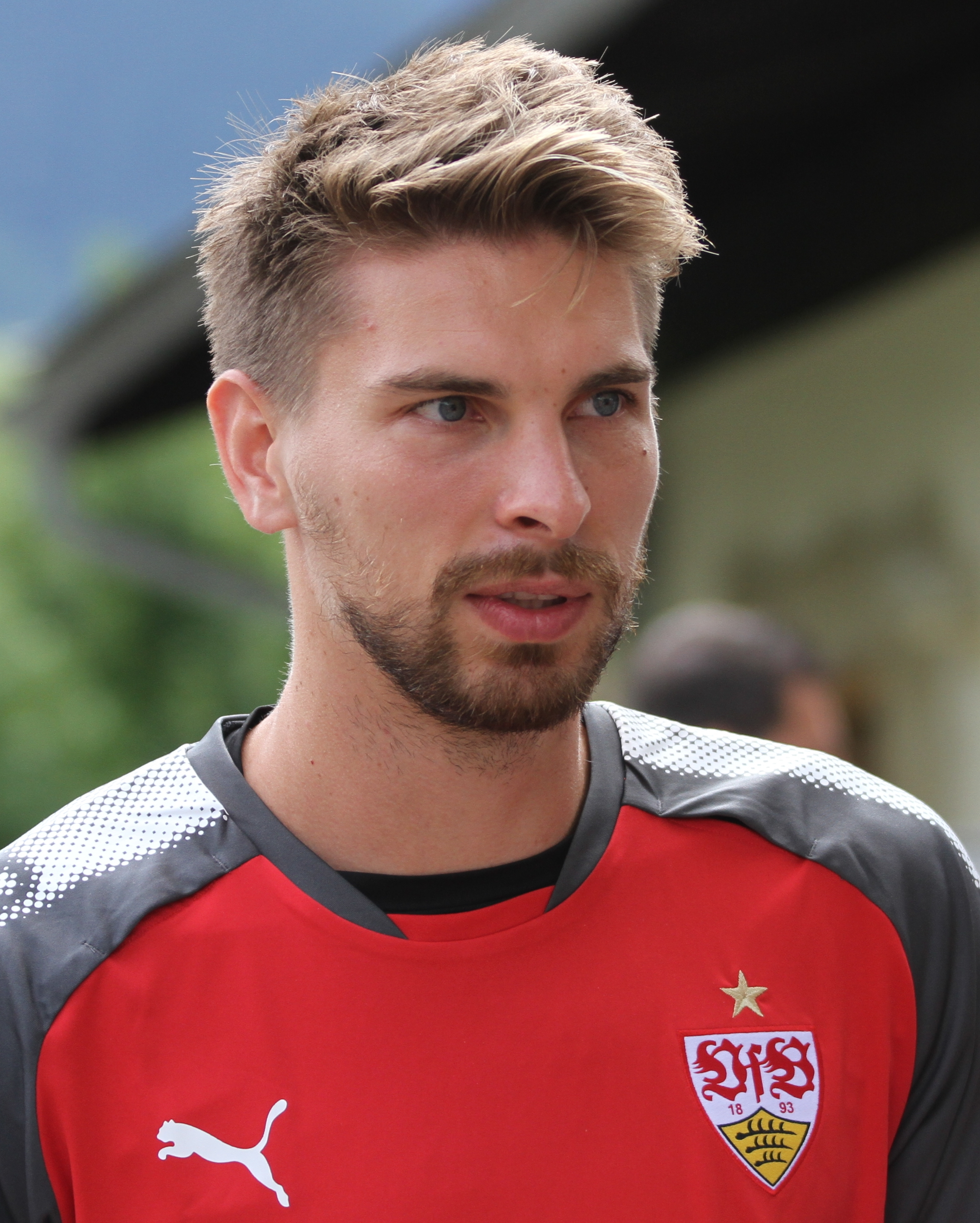 Ron-Robert Zieler im Trainingslager in Grassau. Aufgenommen von